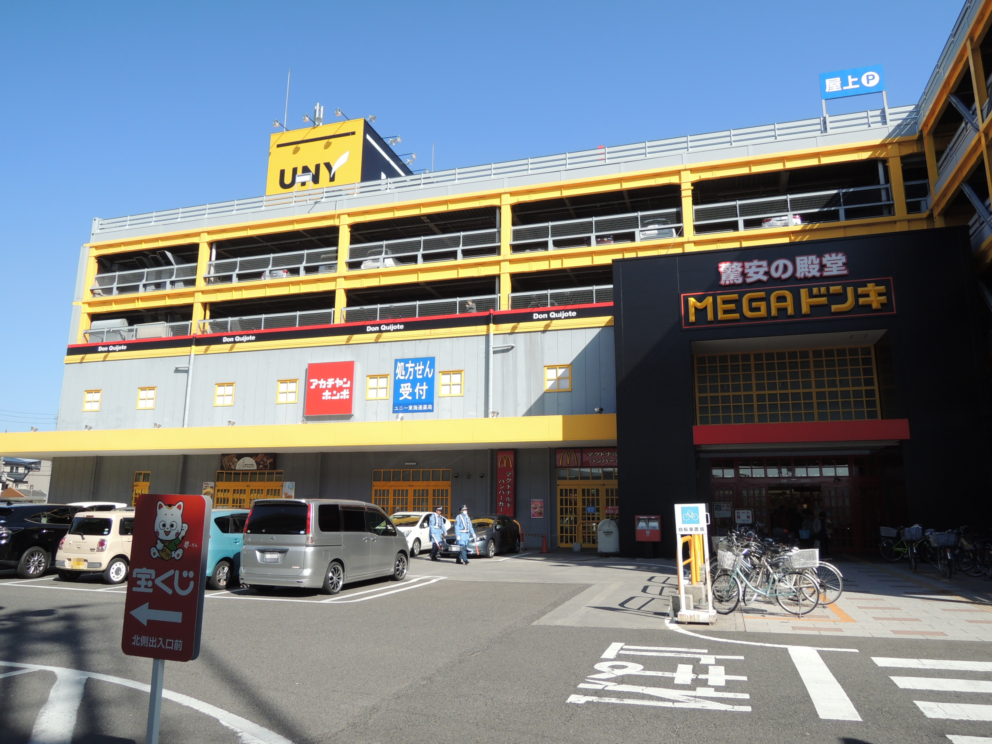 MEGAドン・キホーテUNY東海通店 西側入口